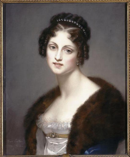 pastel Dorothée de Courlande